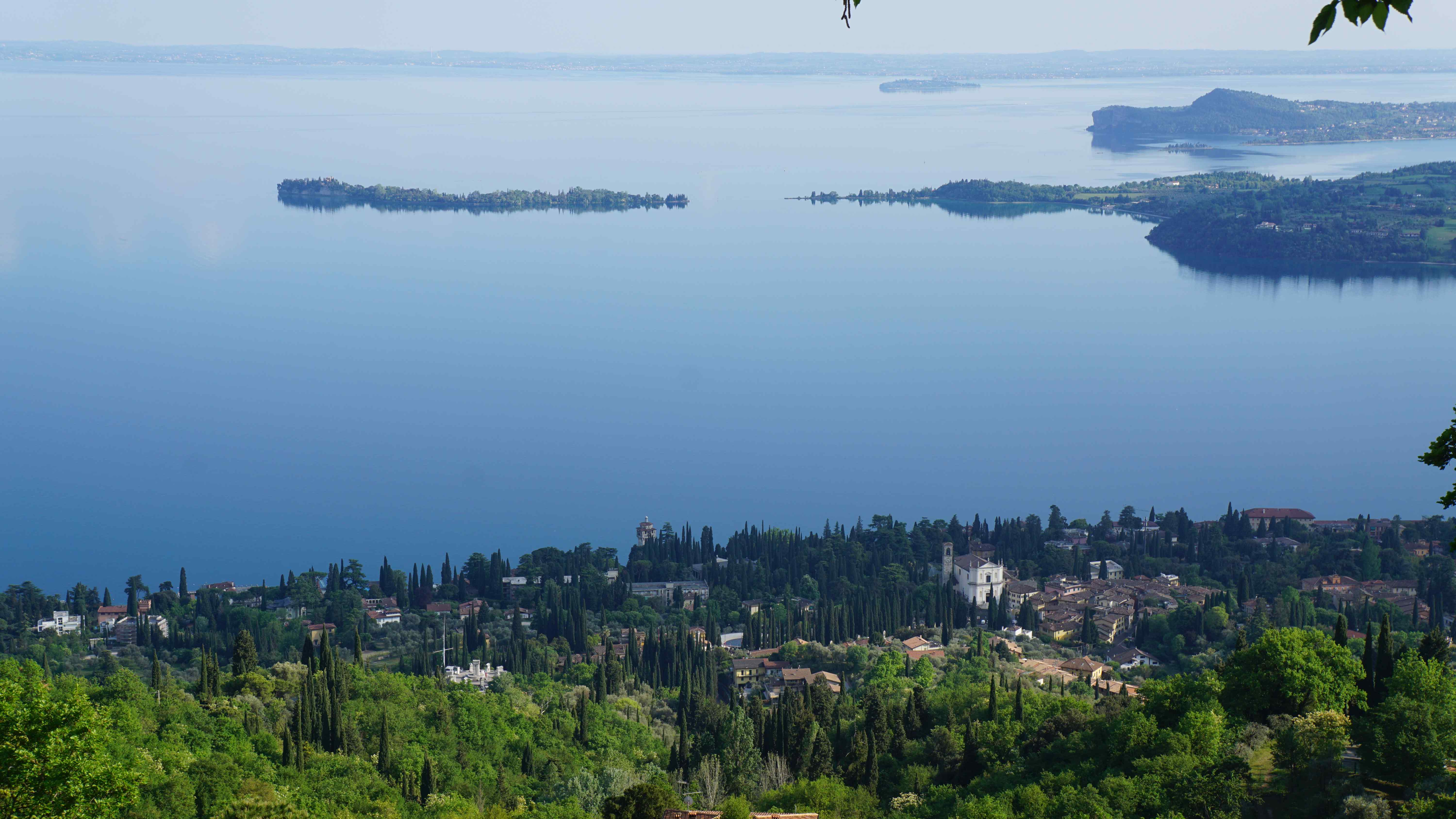 Gardone Riviera visto dall'alto di via della Calma